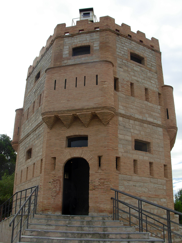 Torre situada al sur oeste de la ciudad de Tudela junto al barrio de Lourdes. Según las excavaciones arqueológicas llevadas en su contorno y en el interior ( Aljibe que es lo único que queda de su época original s.X ) pertenecería a una torre Atalaya (construcción) para poder controlar la posible llegada de enemigos por esa zona.